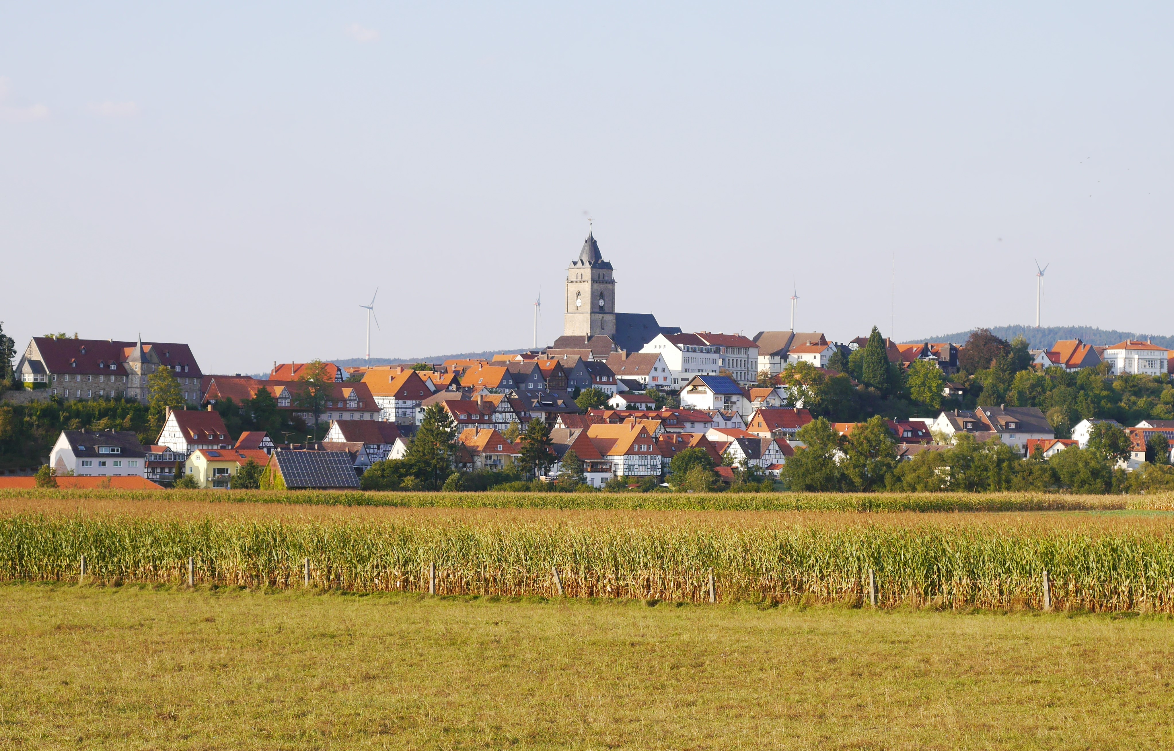 Blick auf die Stadt Wolfhagen von Süden